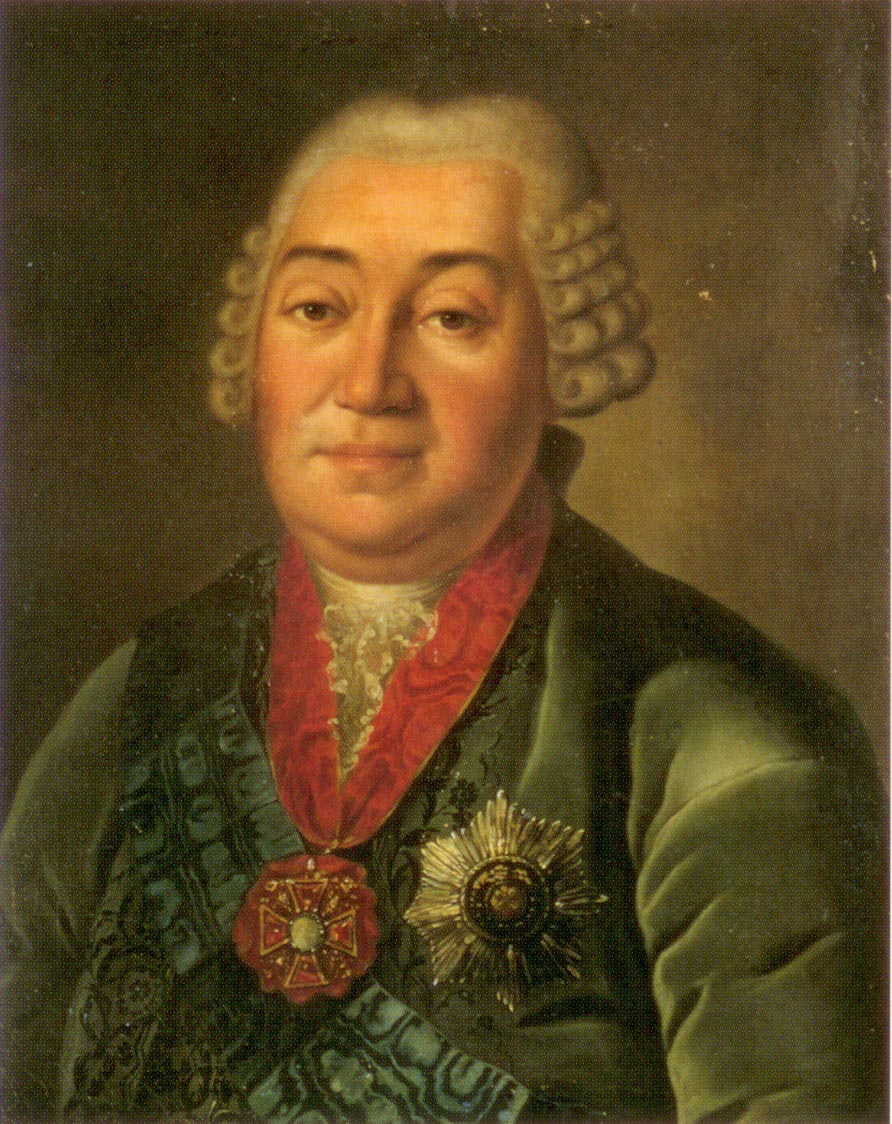 Яков Петрович Шаховской (1705-1777), князь, обер-прокурор Синода.